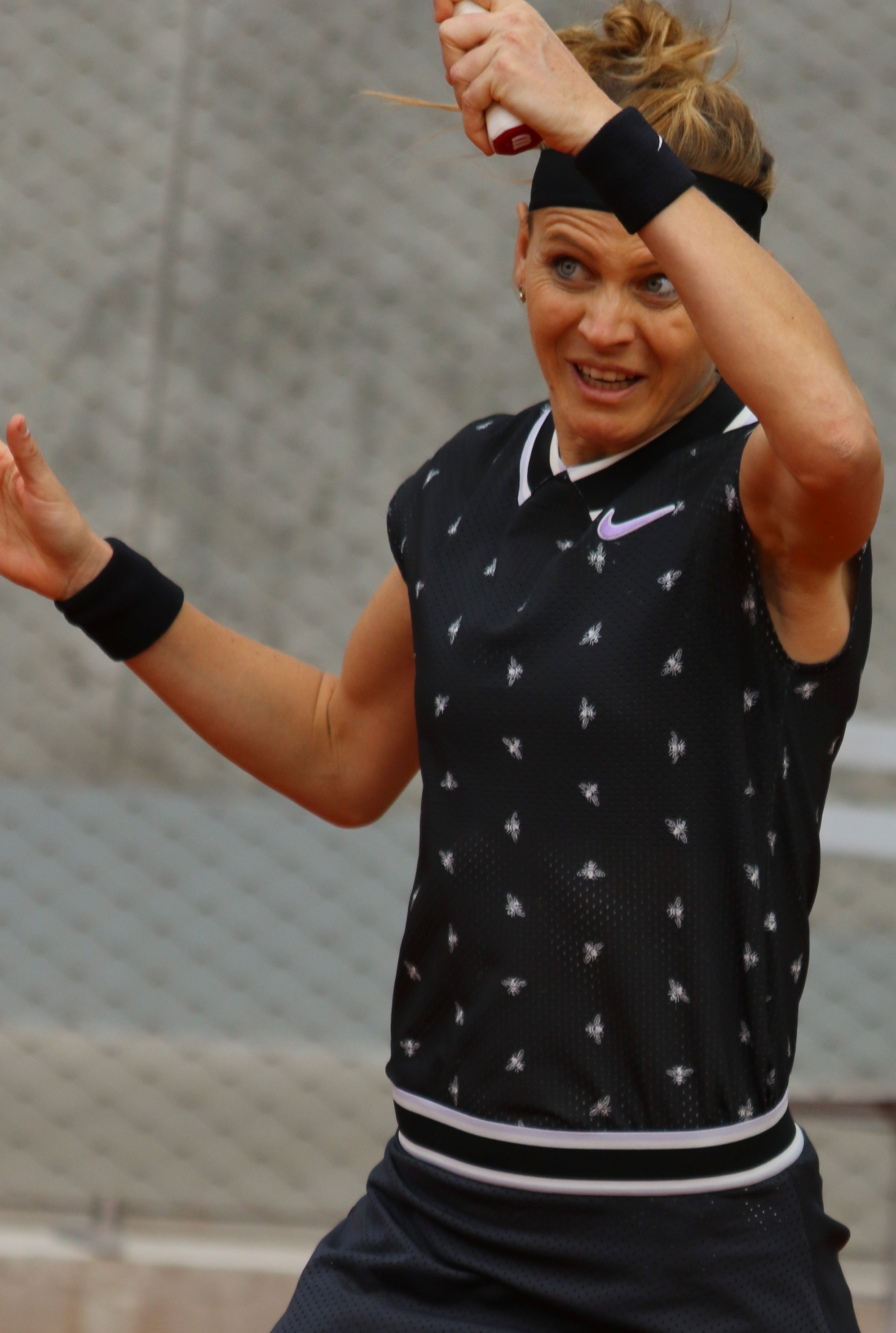 Safarova RG19 (21)